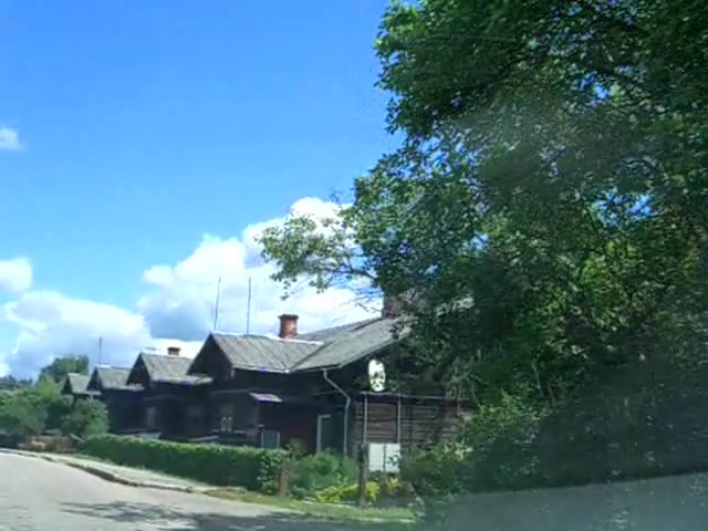 Līgatne Arbeiterhäuser 2015